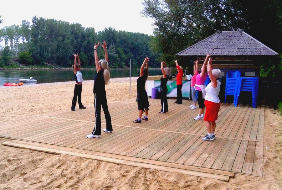 Gym sur la plage